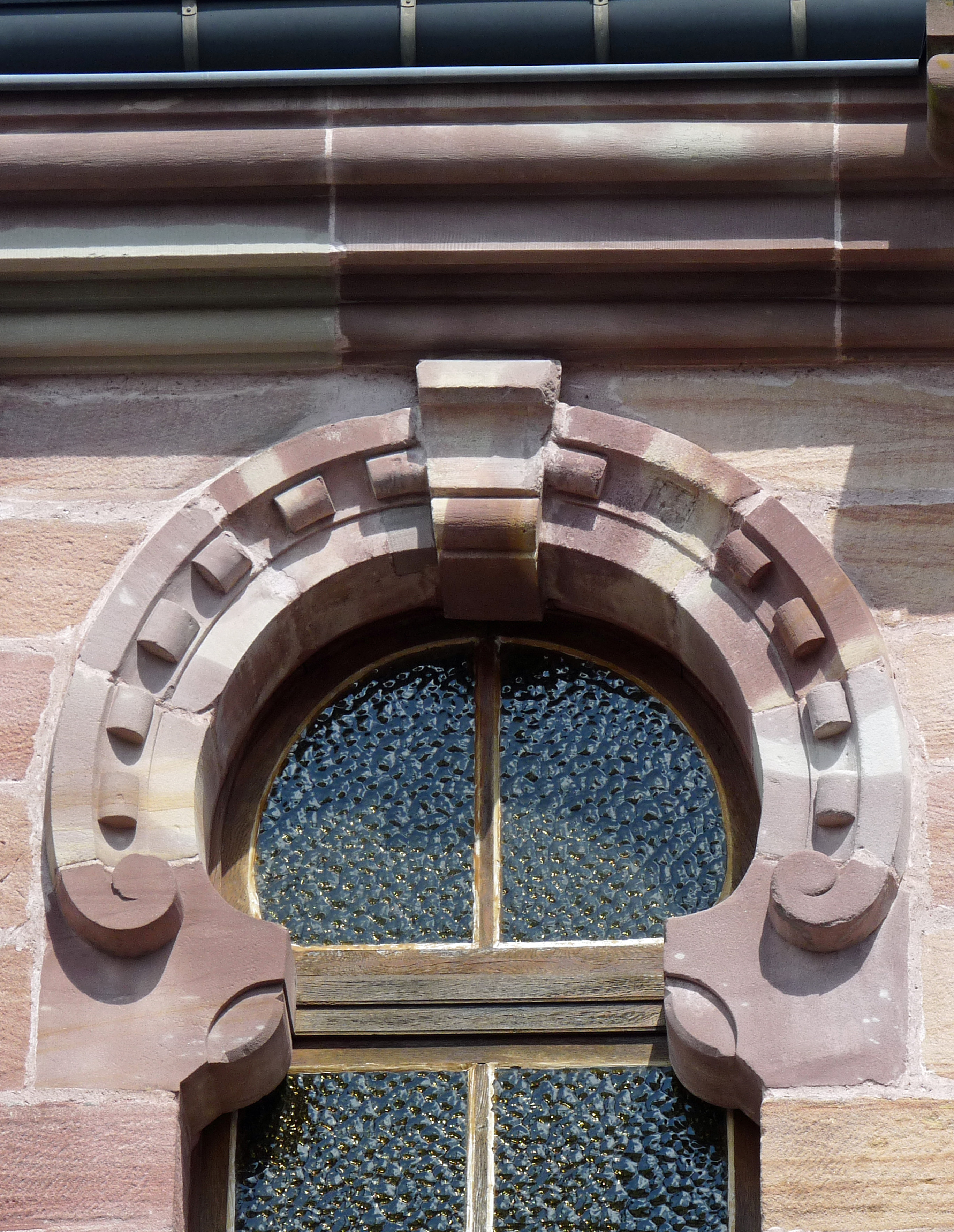 Bruyères (Vosges) : ancienne synagogue, aujourd'hui Musée Henri-Mathieu